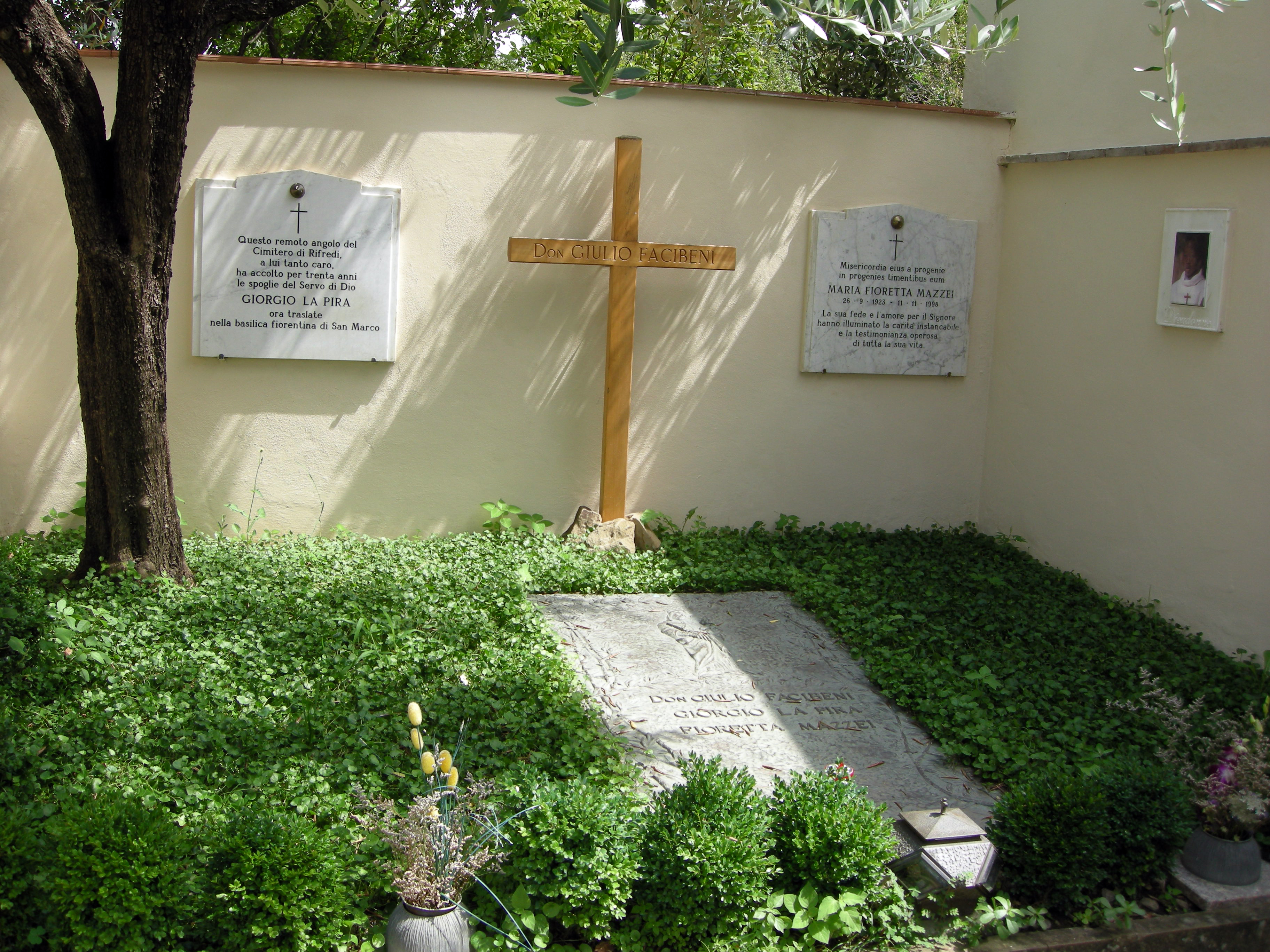 Cimiterio di Rifredi di Firenze